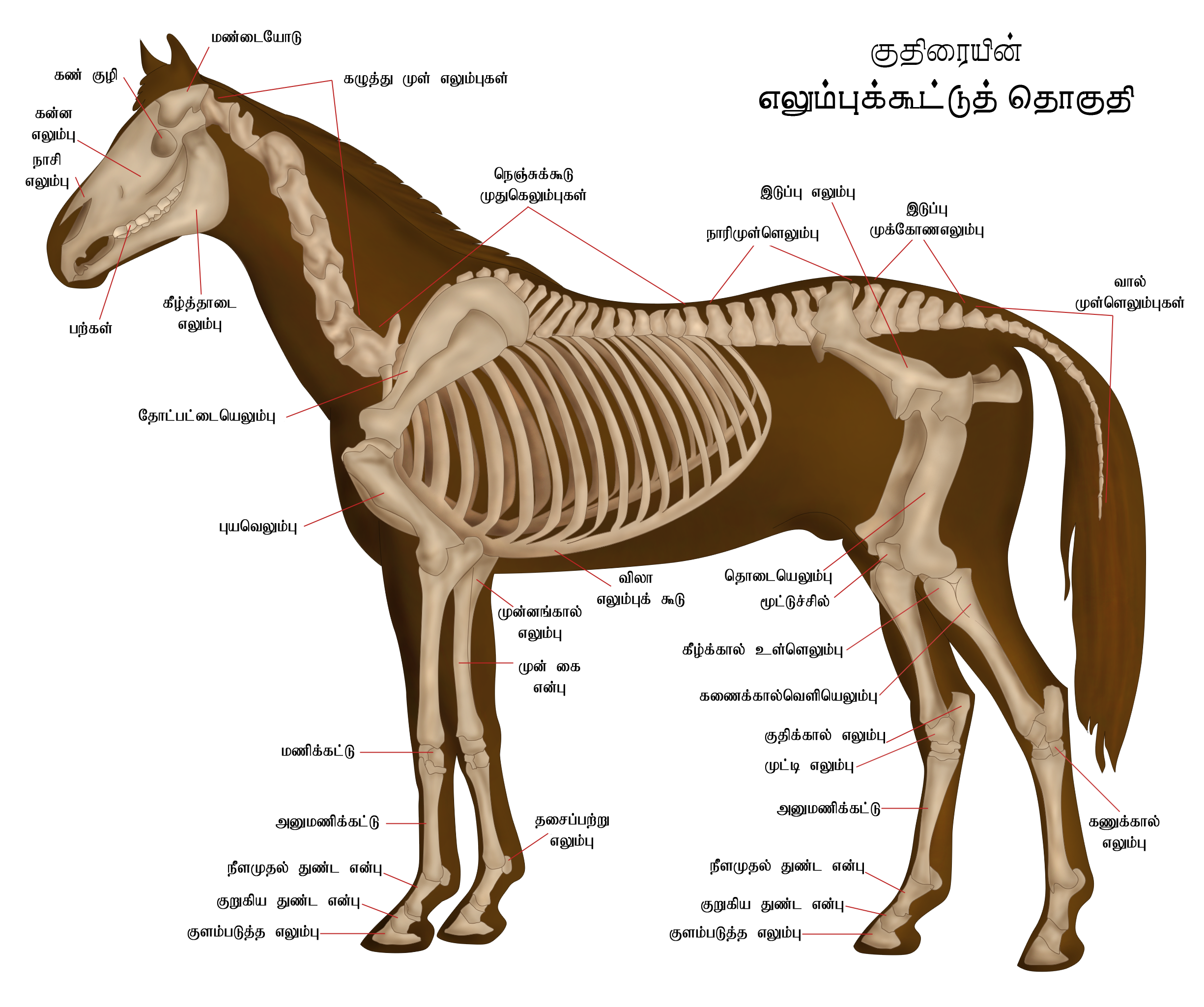 குதிரை எலும்புத்தசை அமைப்பு